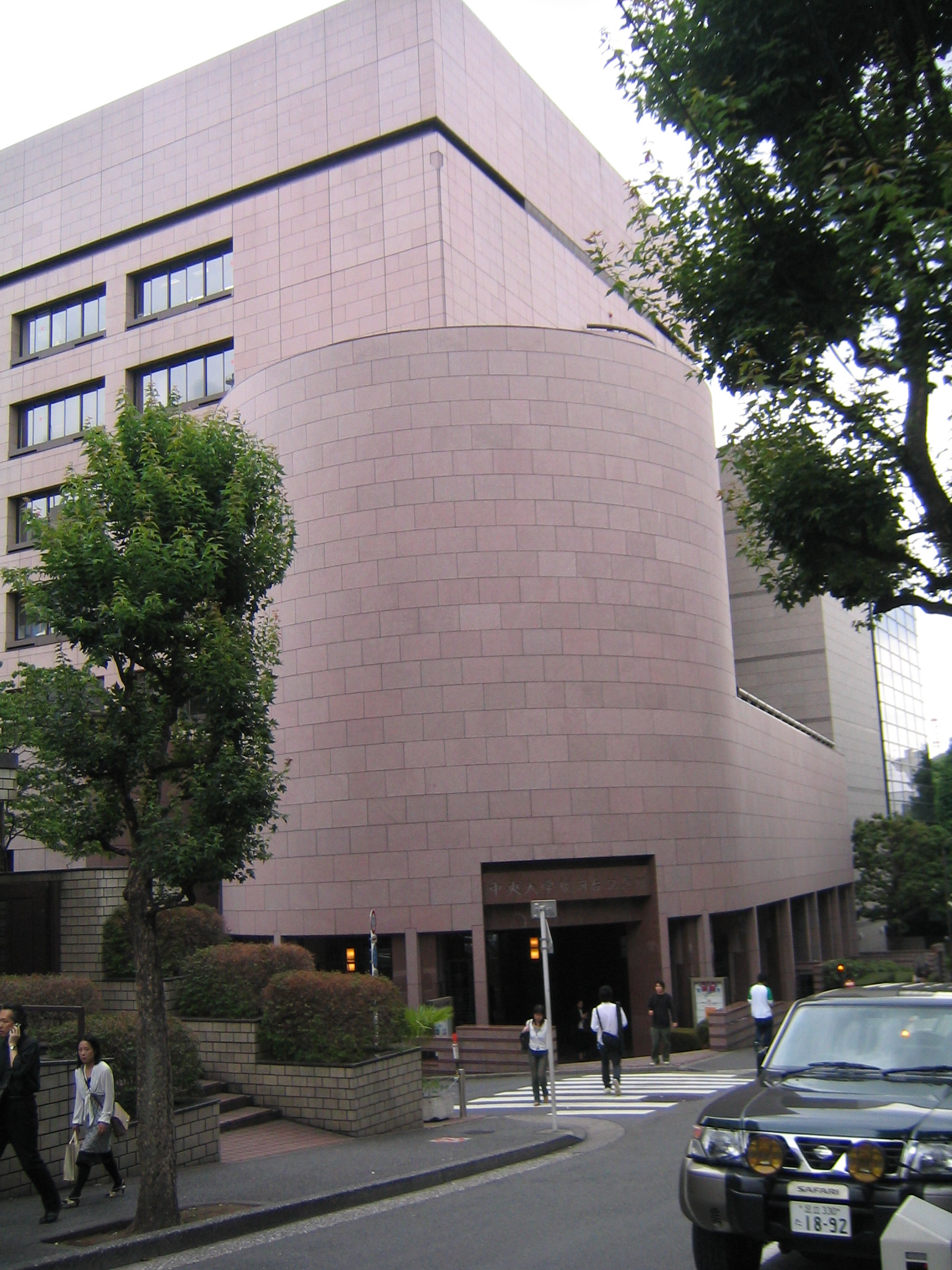 中央大学駿河台記念館